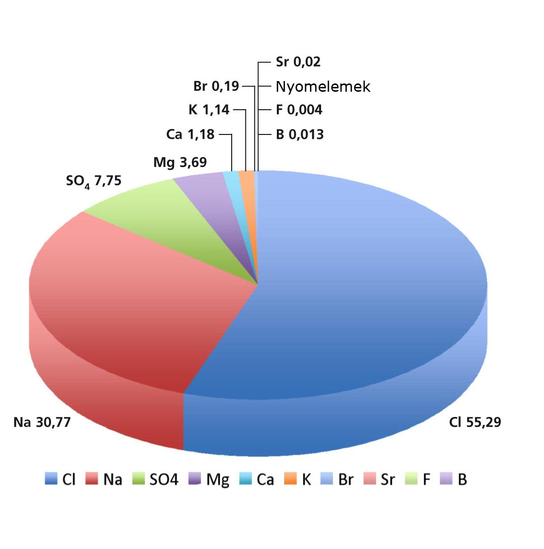 Ásványi anyagok